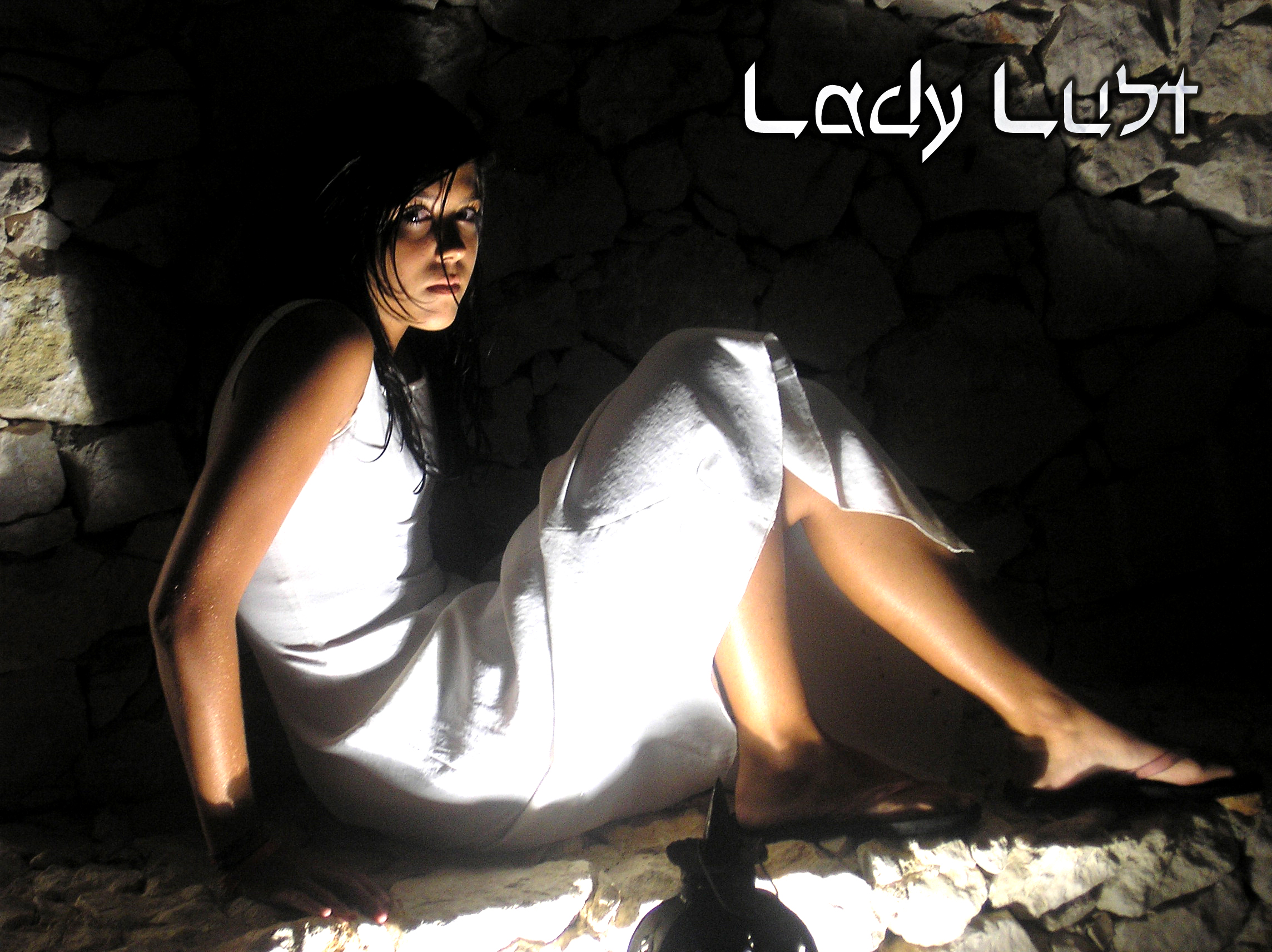 Lady Lust